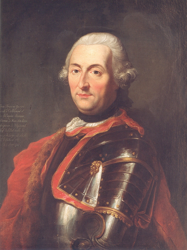 Jean-François-Georges, comte d'Oultremont de Wégimont, en armure